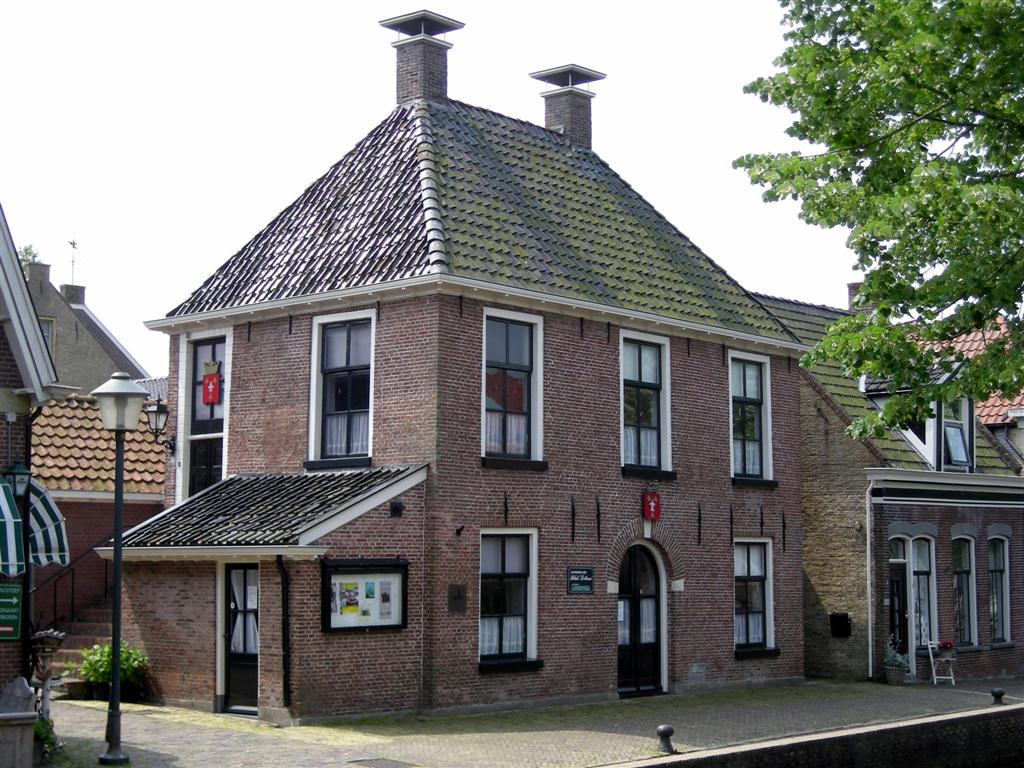 Waag in Oldeboorn